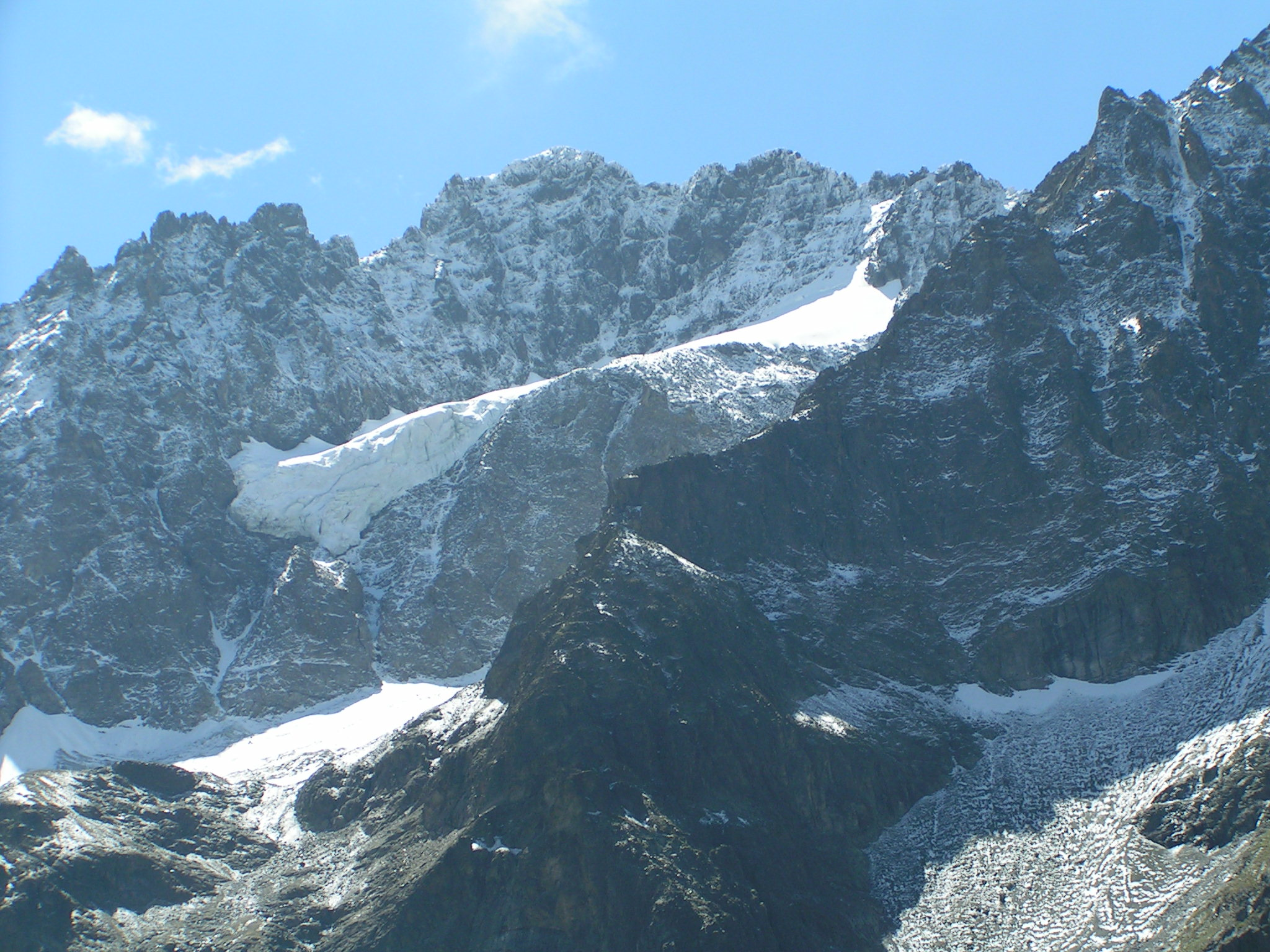 De Verpeilspitze links met in het midden de Verpeilferner